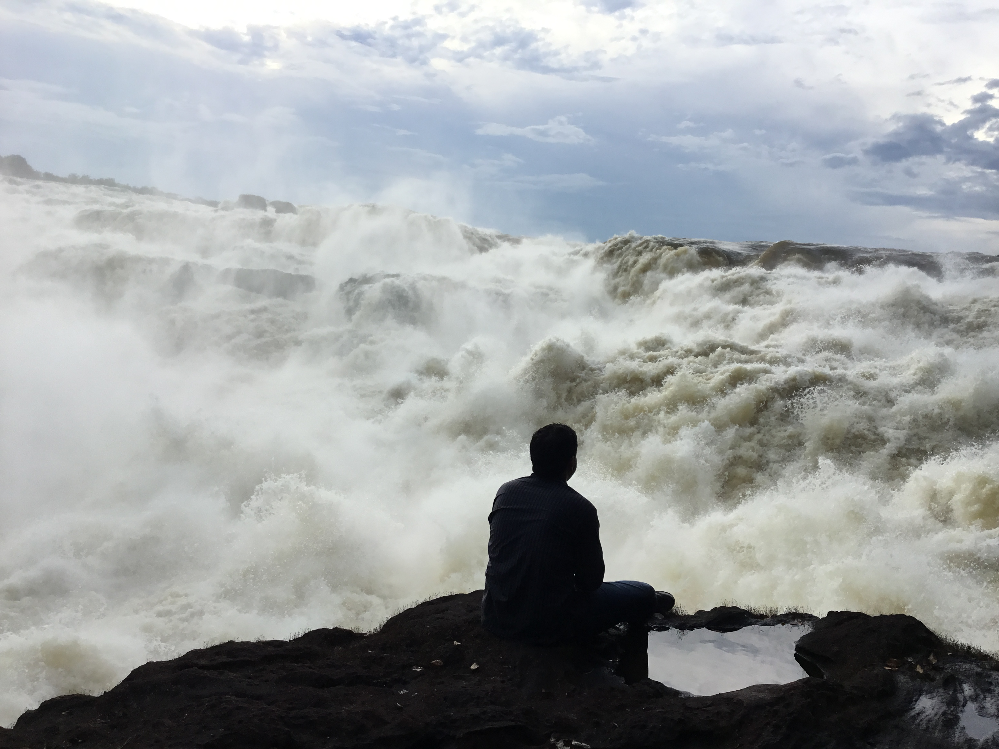 Esta fotografía fue tomada en un área protegida de Colombia con el código 52 del RUNAP.